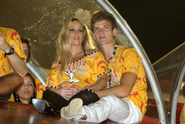 Jonatas Faro faz carinho na barriga de Danielle Winits, que está grávida, enquanto assistem aos desfiles na Sapucaí.